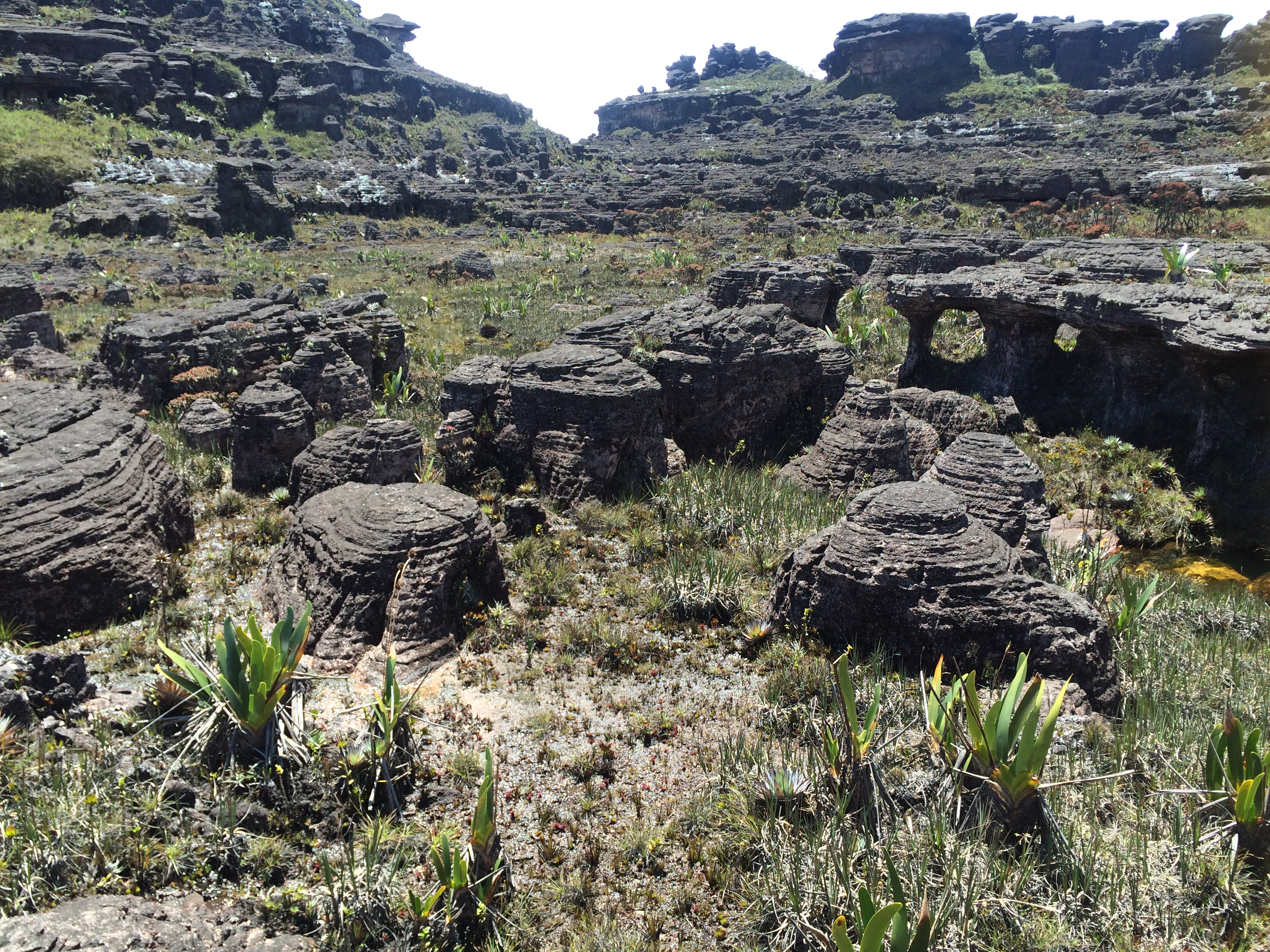 Vale dos elefantes - Monte Roraima